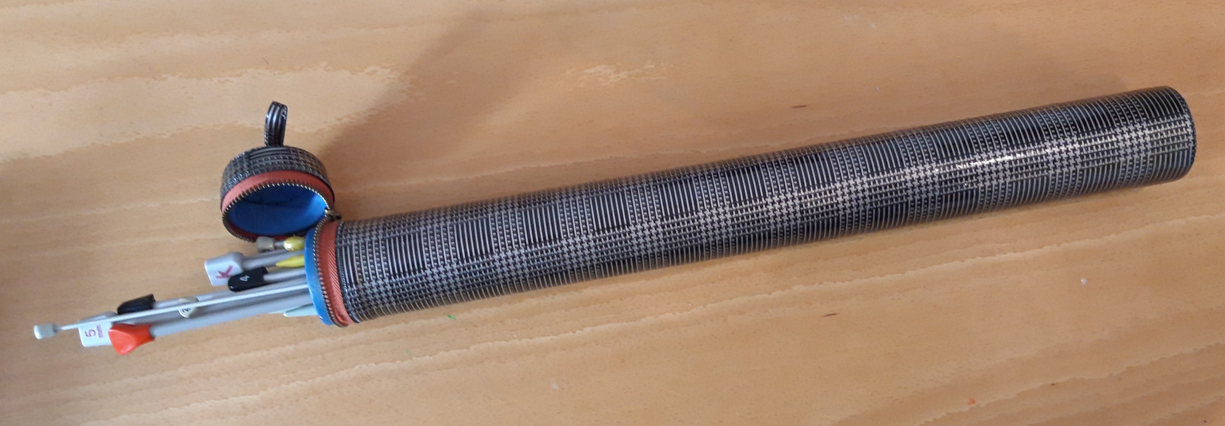 etui voor breinaalden